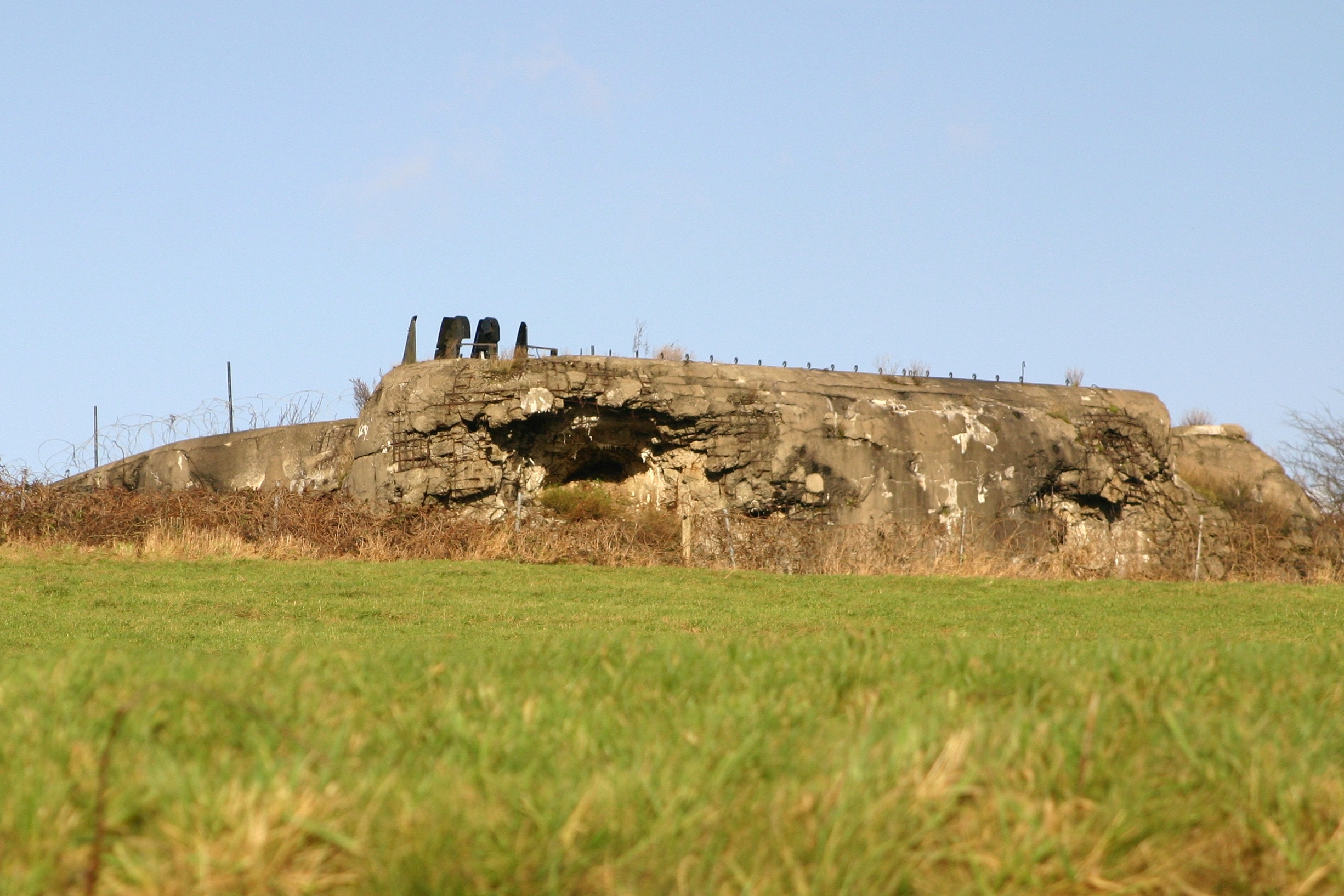 Den Daach vum Fort vu Süde gesinn. Aubin Fort Aubin